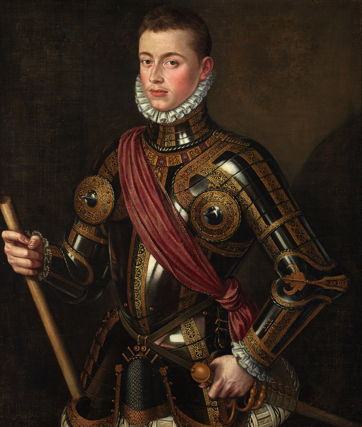 Retrato de Don Juan de Austria († 1578), que fue hijo ilegítimo del emperador Carlos I de España y de la noble alemana Bárbara Blomberg, así como hermanastro del rey Felipe II de España.